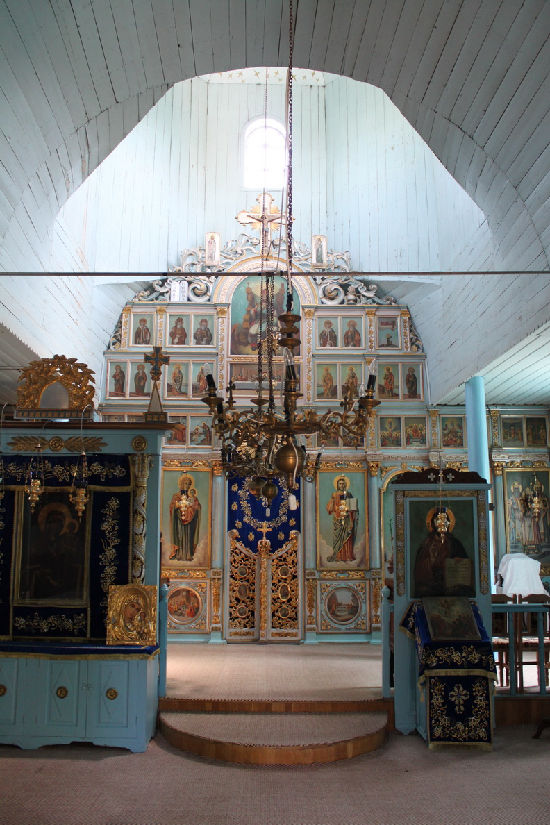 Biserica de lemn de la Mănăstirea Saon, judeţul Tulcea.